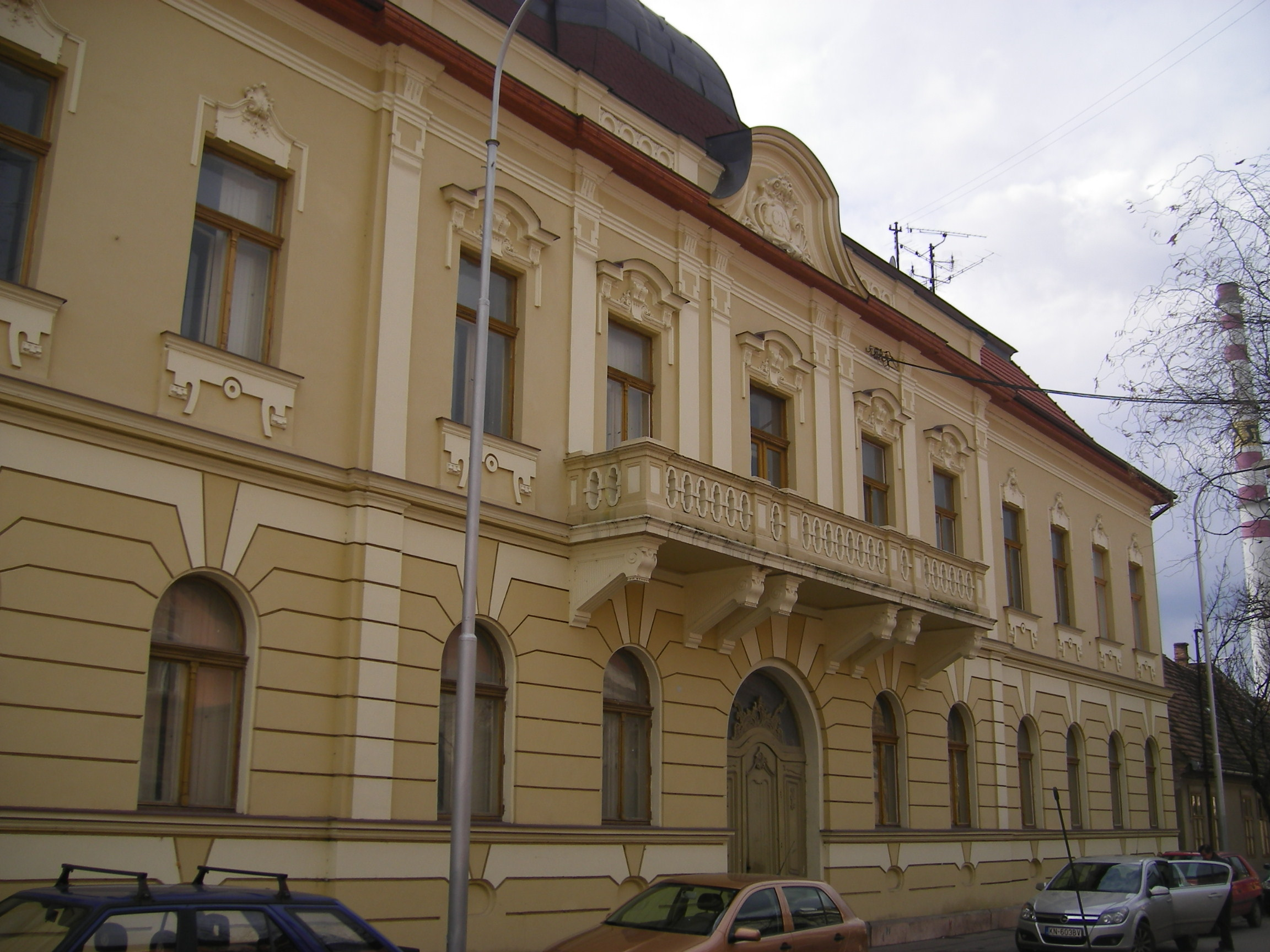 Komárom - a szerb ortodox templom Nádor-utcára néző része